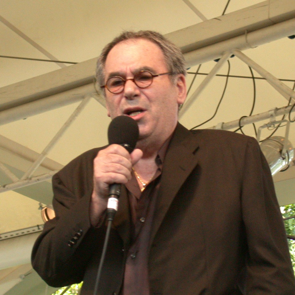 Dernier concert de Claude Nougaro au Paris Jazz Festival dans le parc floral du Bois de Vincennes